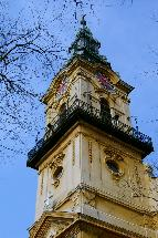 Sarlós Boldogasszony templom, Kiskunfélegyháza